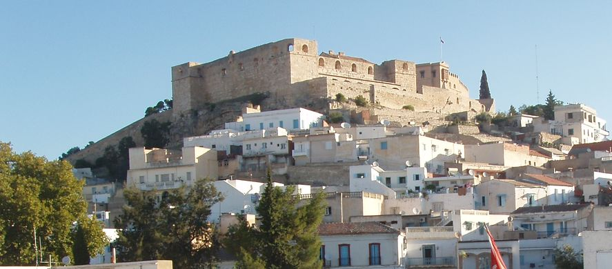 El Kef et sa Kasbah